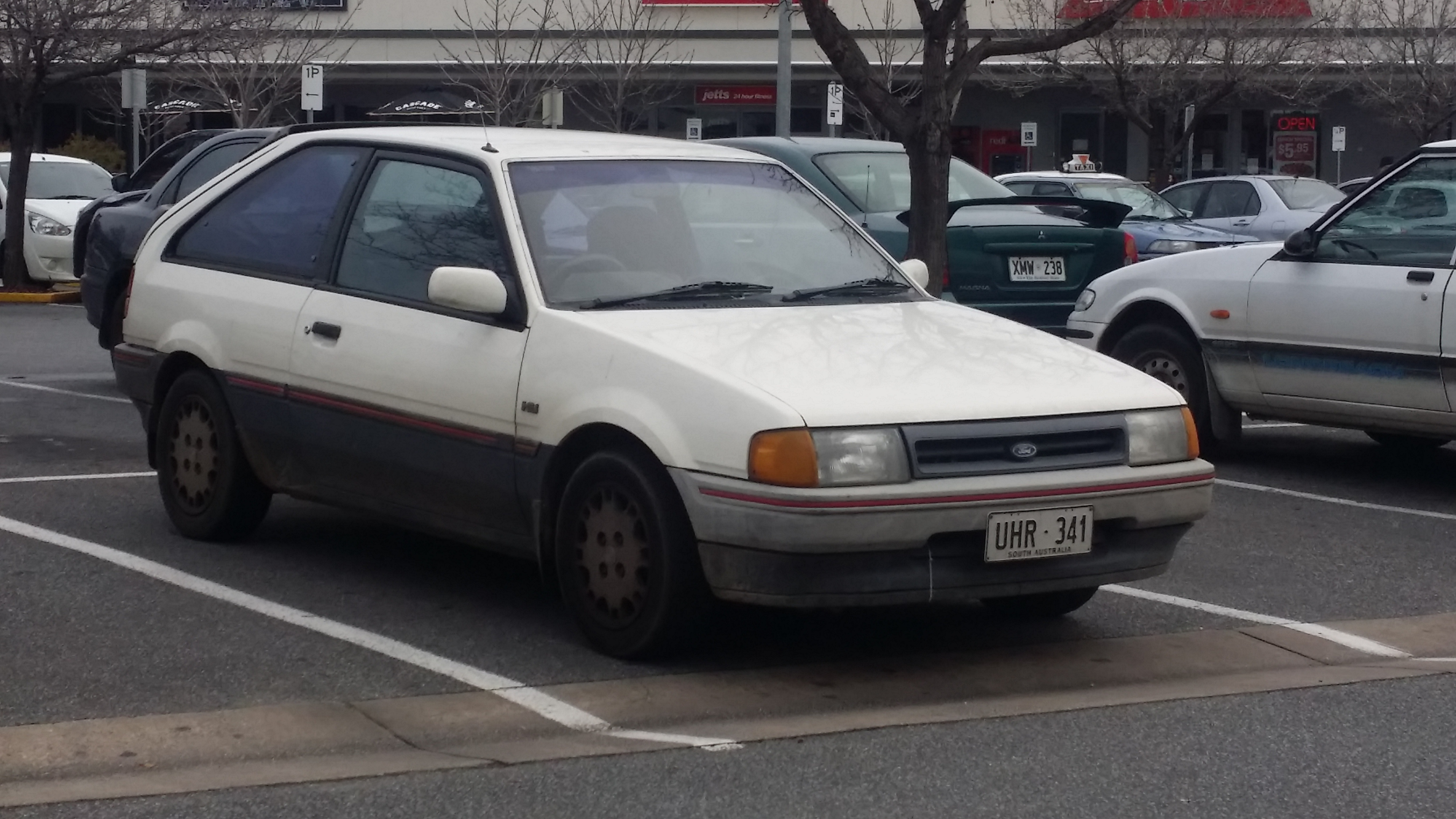 Ford Laser TX3